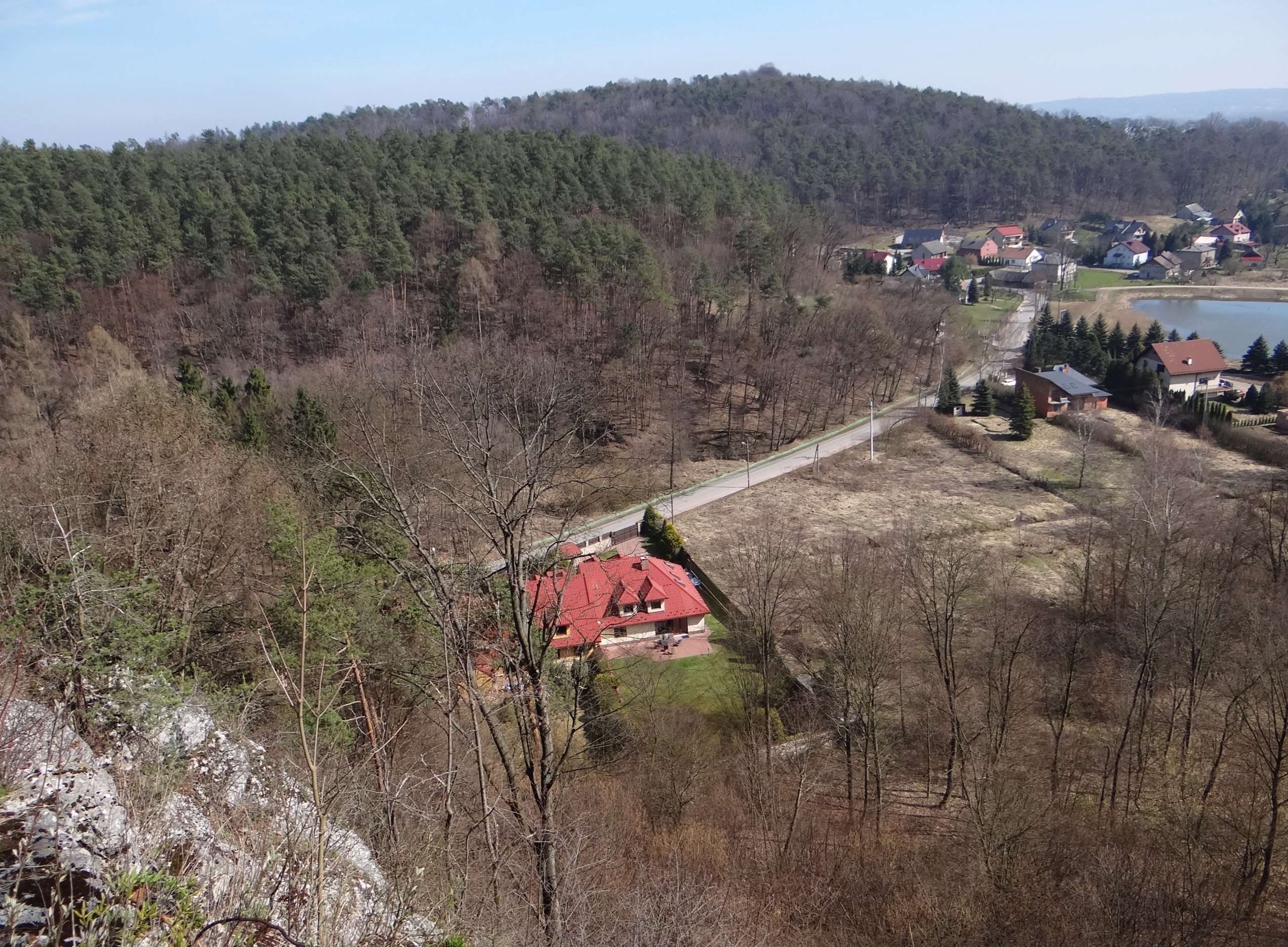 Winna Góra w aleksandrowicach. Widok ze skały Krzywy Sąd